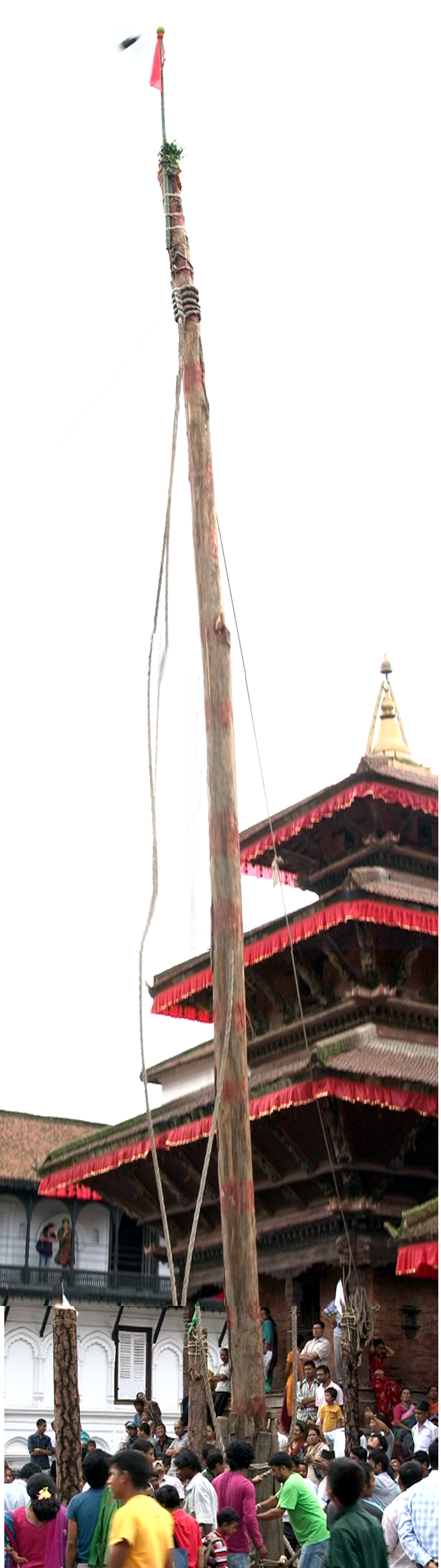 नेपाली: इन्द्रजात्रामा ठड्याइएको लिङ्गो